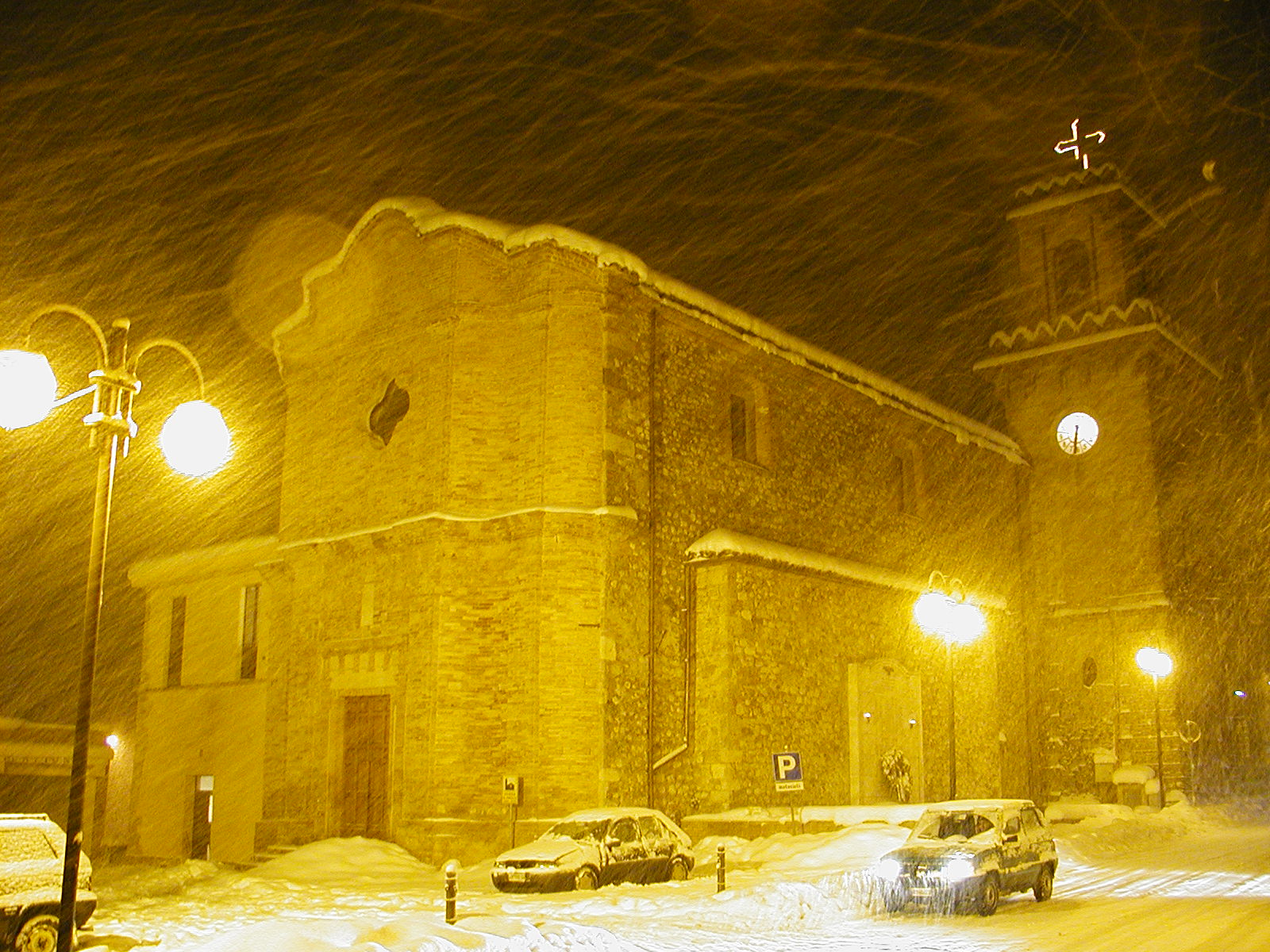 Torricella Sicura chiesa parrocchiale di San Paolo con la neve. Autore Sandro De Marcellis